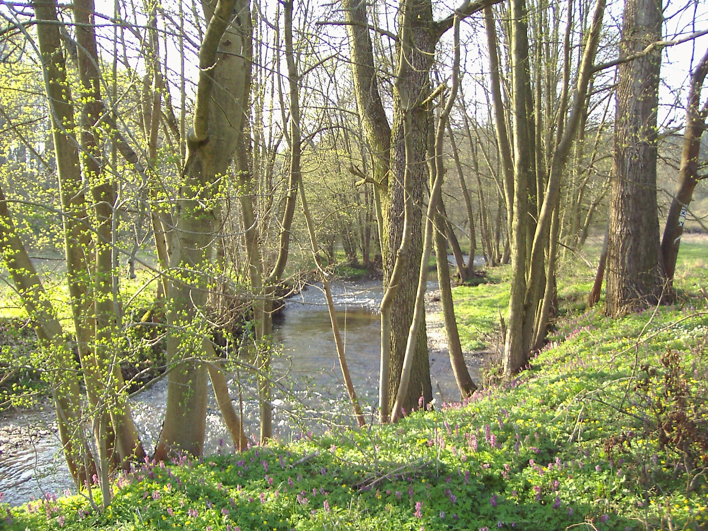 Die Unstrut bei Reiser mit Auwaldgalerie und Frühblühern (Scharbockskraut und Hohler Lerchensporn).